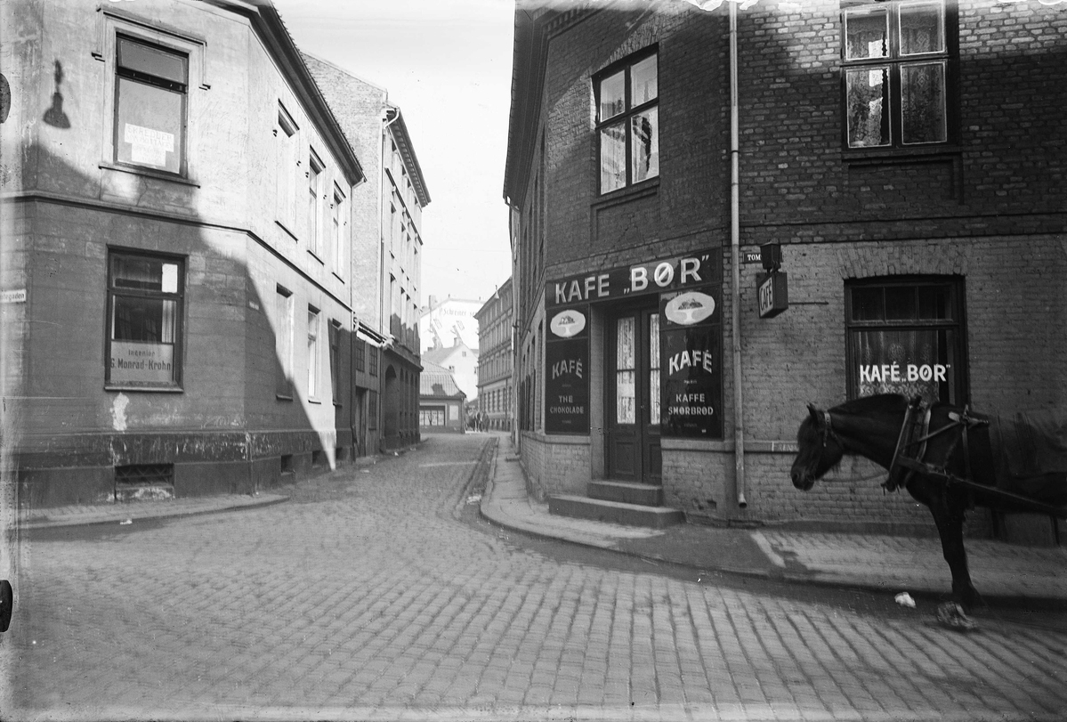 Persgangen sett fra hjørnet av Tomtegata mot Vognmannsgata